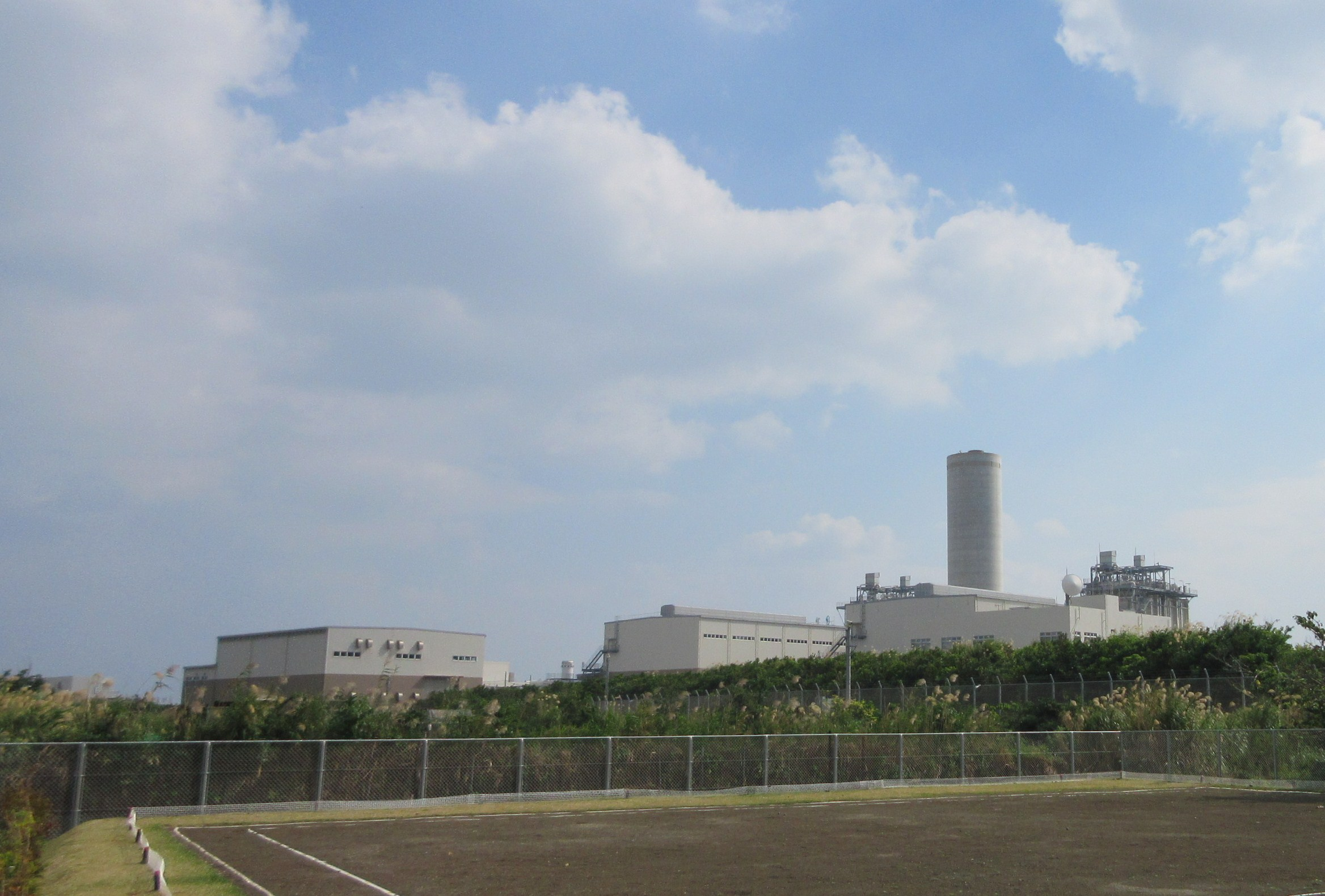 沖縄電力株式会社吉の浦火力発電所